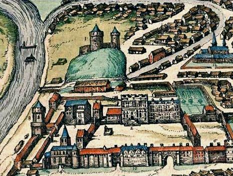 Wilno, Zamek Górny, Zamek Dolny. "Civitates orbis terrarum", fragment mapy